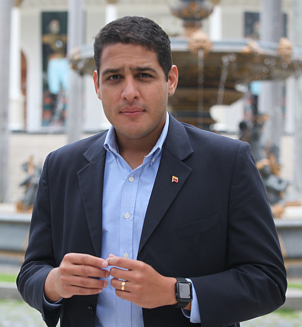 José Manuel Olivares, diputado venezolano